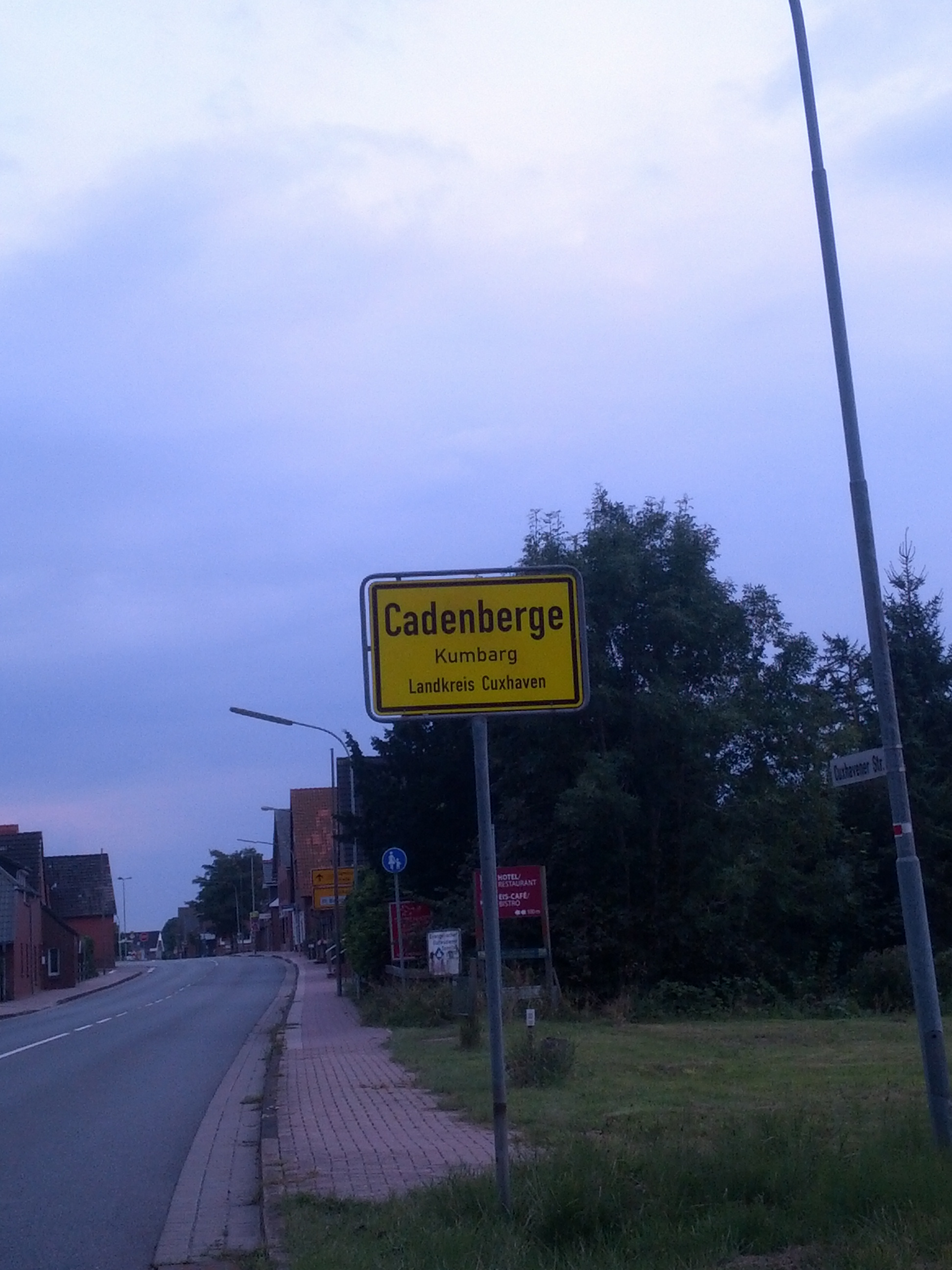 tweesprakig Oortsschild Kumbarg